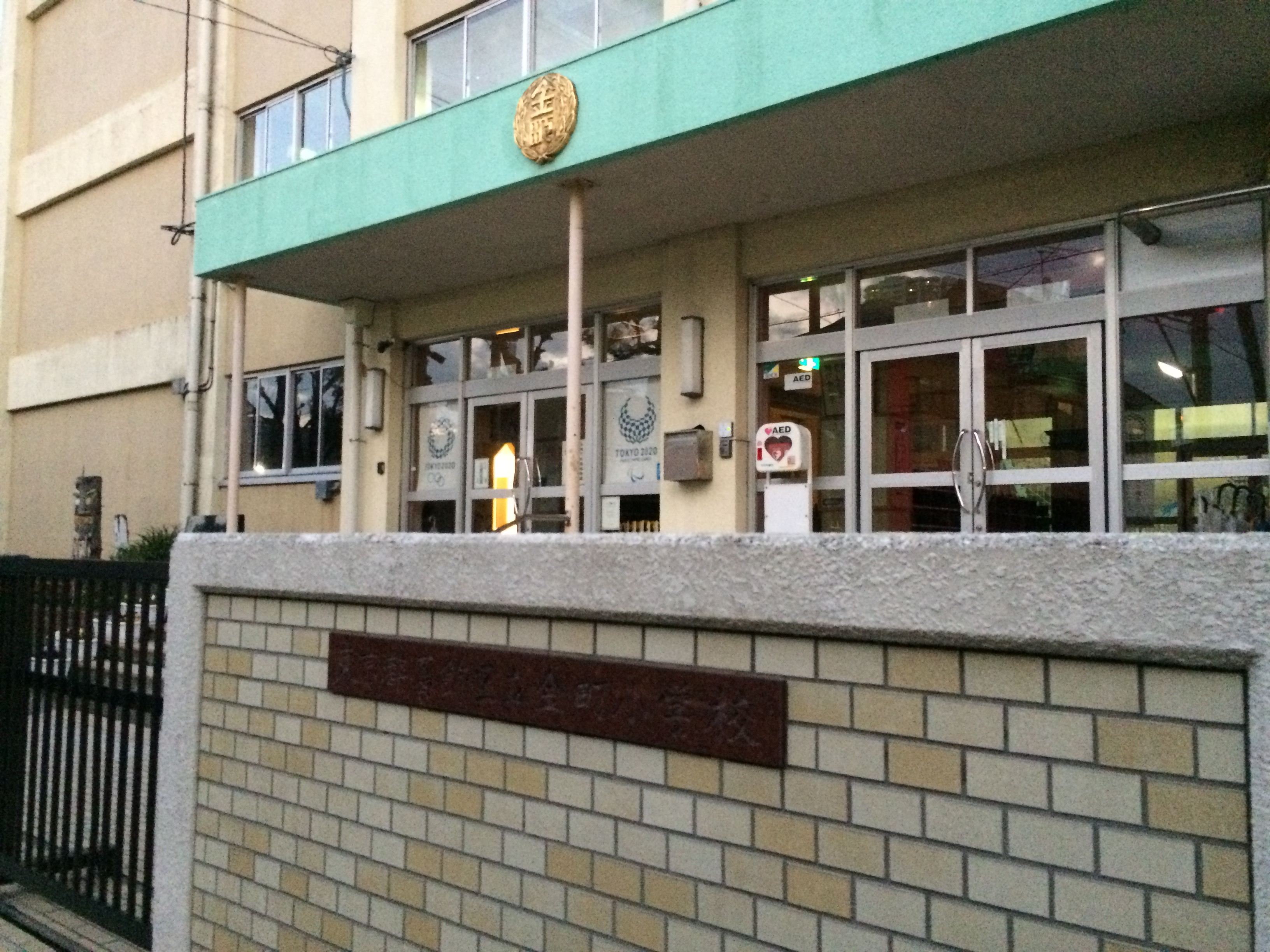 葛飾区立金町小学校の正門